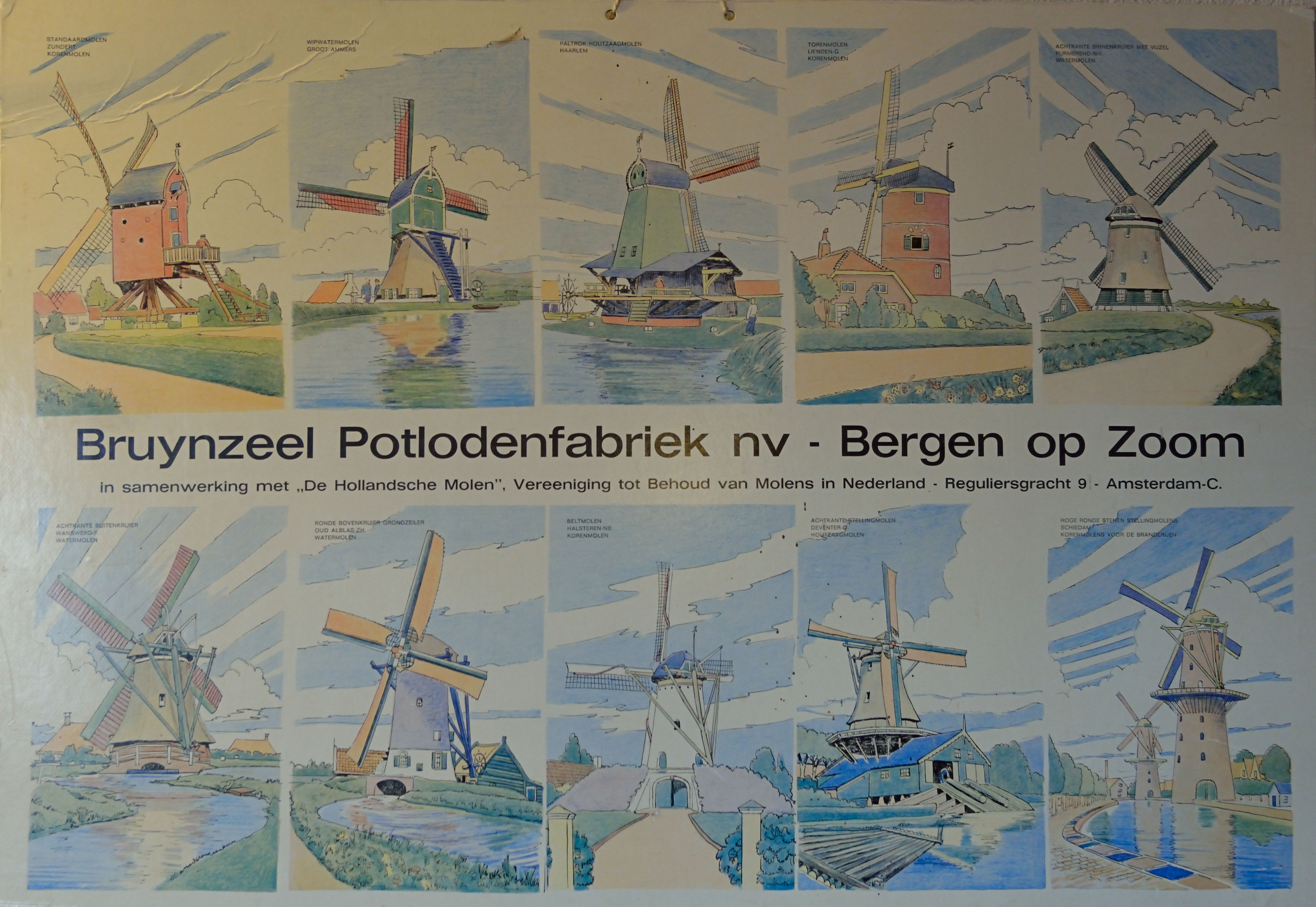 Molentypen, Bruynzeel potlodenfabriek